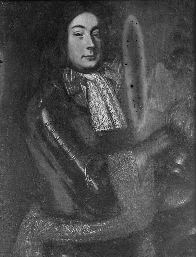 Portrait des Fürsten Georg August Samuel von Nassau-Idstein (1665-1721). Deutsch, um 1690. Öl auf Leinwand, 87 x 68 cm, Schloss Bergheim (Kreis Waldeck)